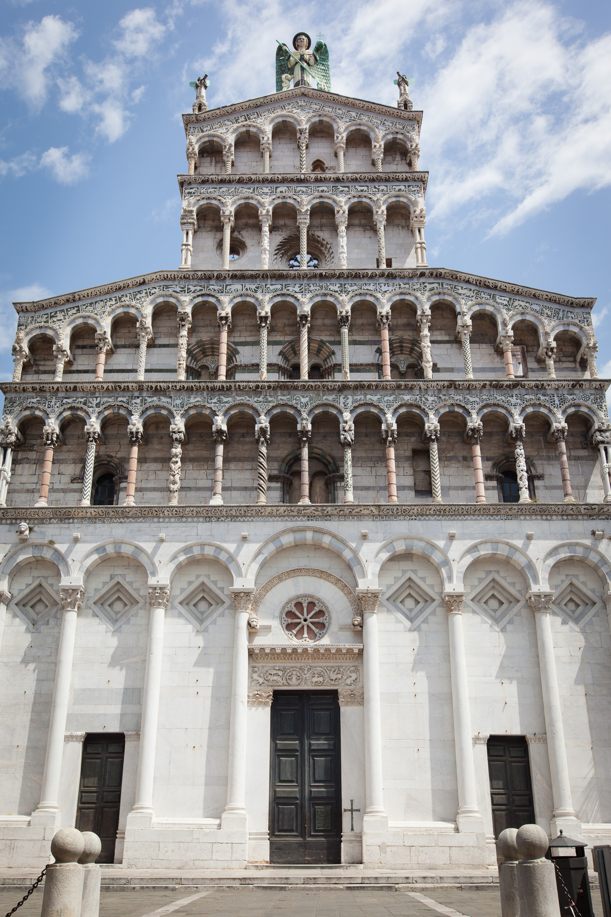 Lucca